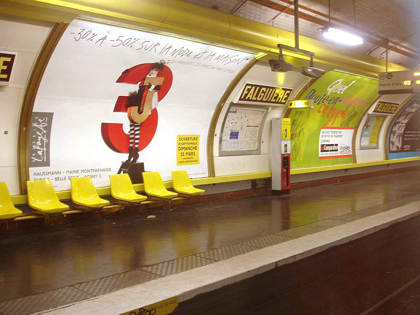 Métro de Paris (France) - ligne 3 - Station Falguière